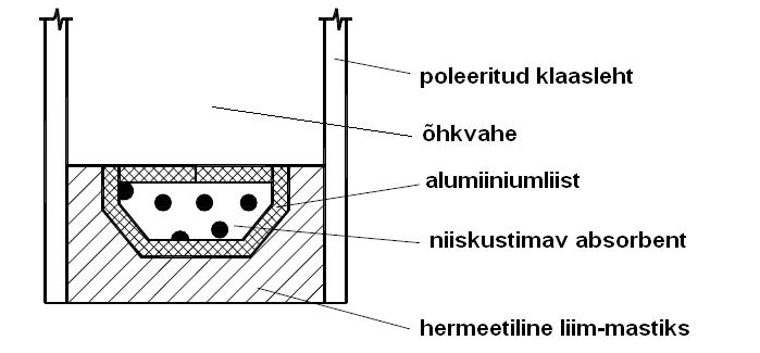 Klaaspakett